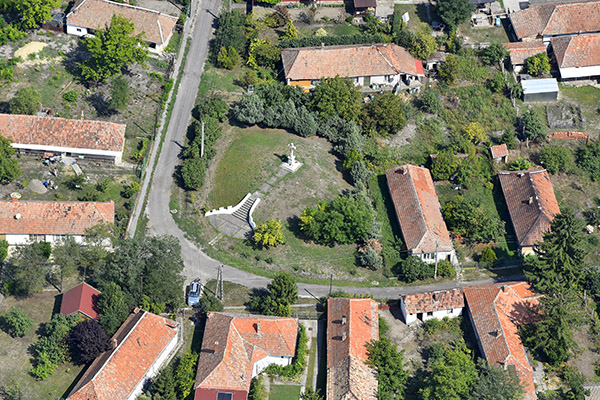 Szihalom, légi felvétel